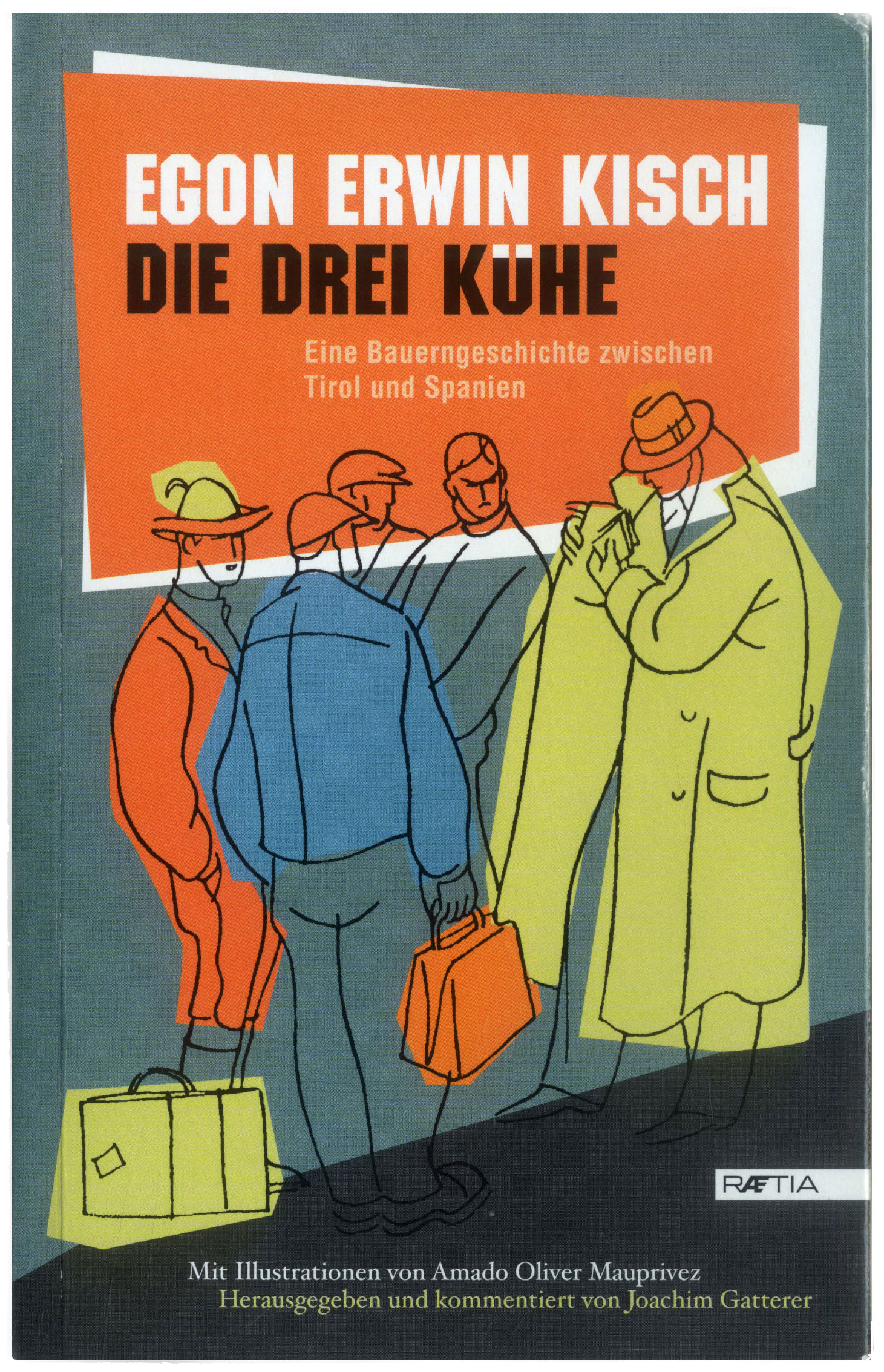 Frontcover Egon Erwin Kisch: Die drei Kühe, Edition Raetia, Bozen 2012